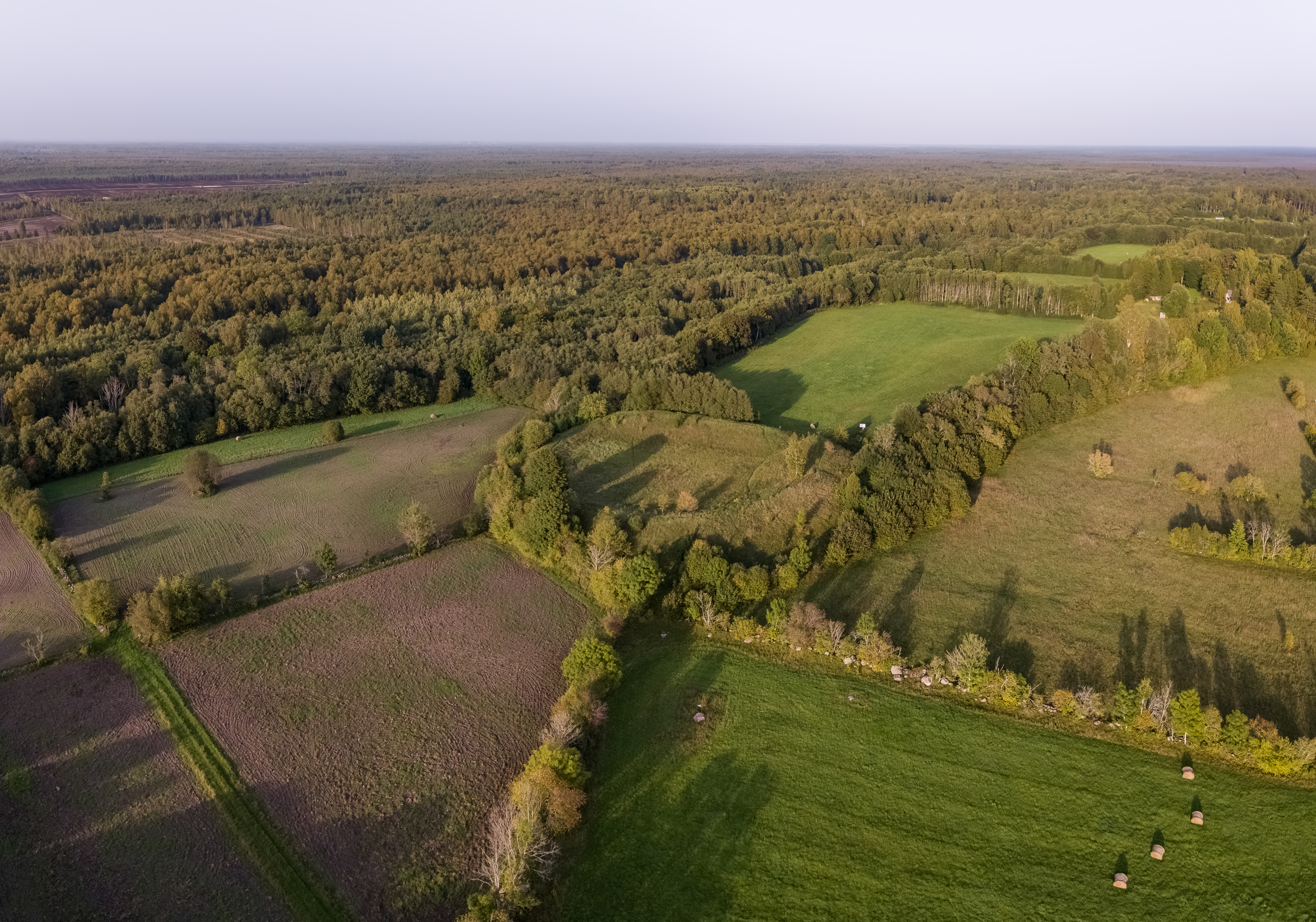 Karuse linnus